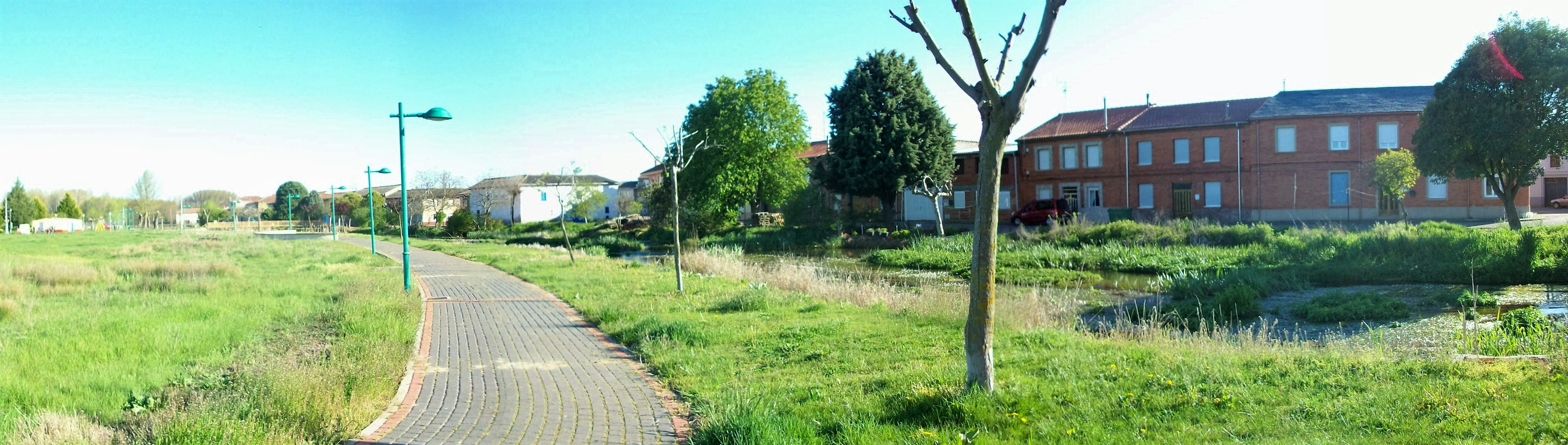 Paseo de la zaya.